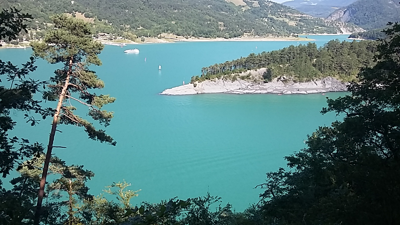 Pinèdes au bord de l'Ebron, près du lac de Monteynard-Avignonet